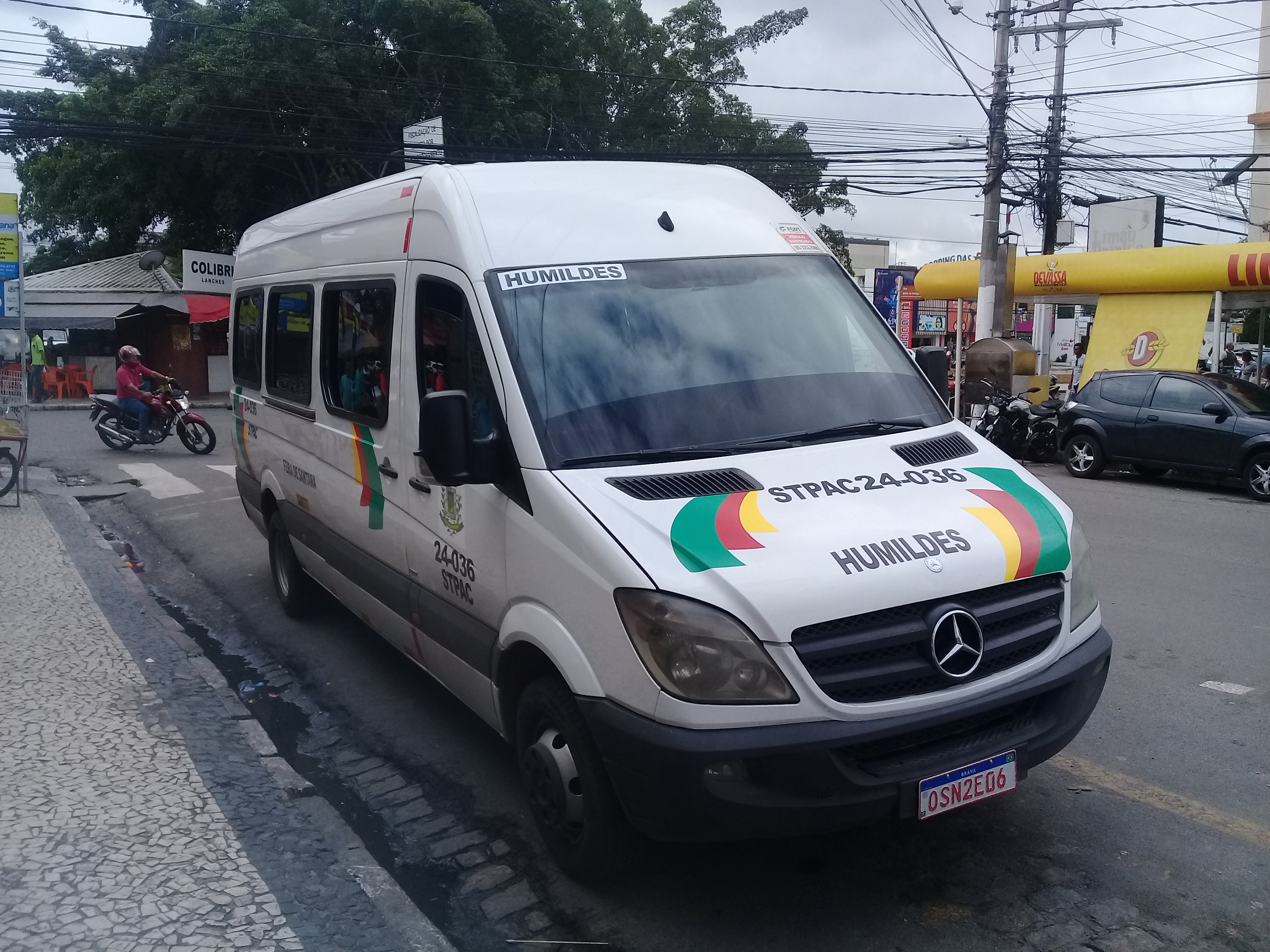 Van do transporte alternativo de Feira de Santana